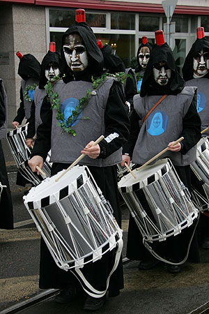 Basler Fasnacht 05